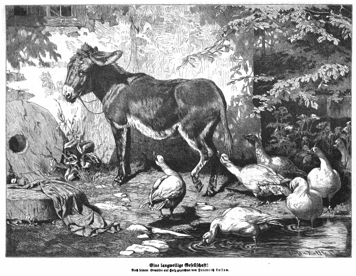 Eine langweilige Gesellschaft! Nach seinem Gemälde auf Holz gezeichnet von Friedrich Lossow